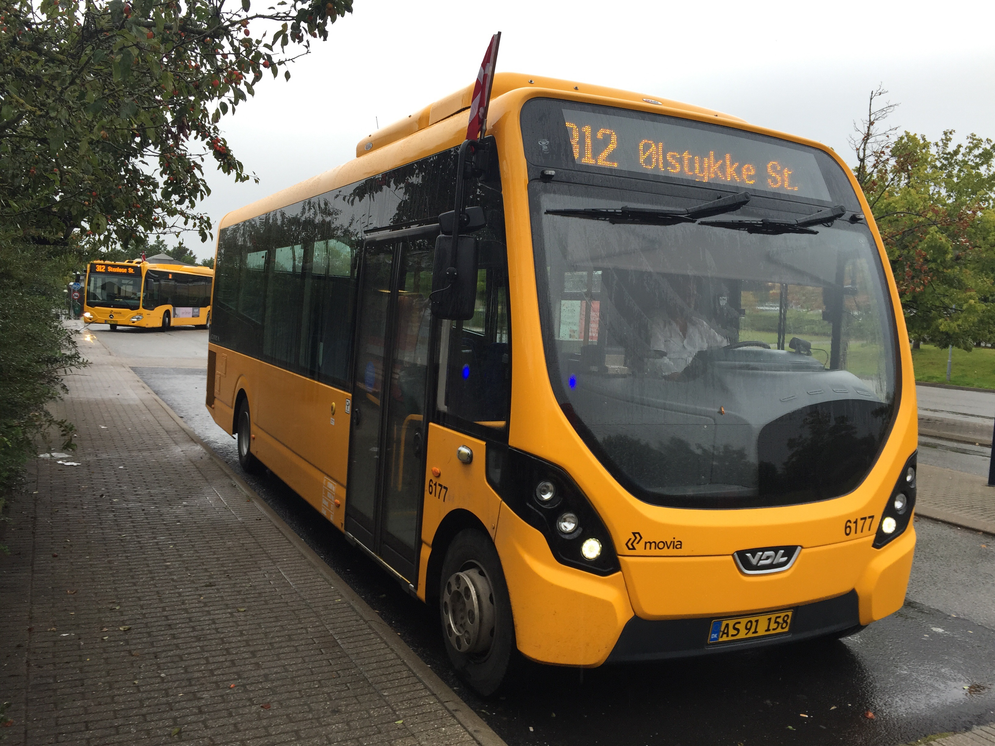 Nobina VDL Citea MLE 88-210 bus som Movia linje 312